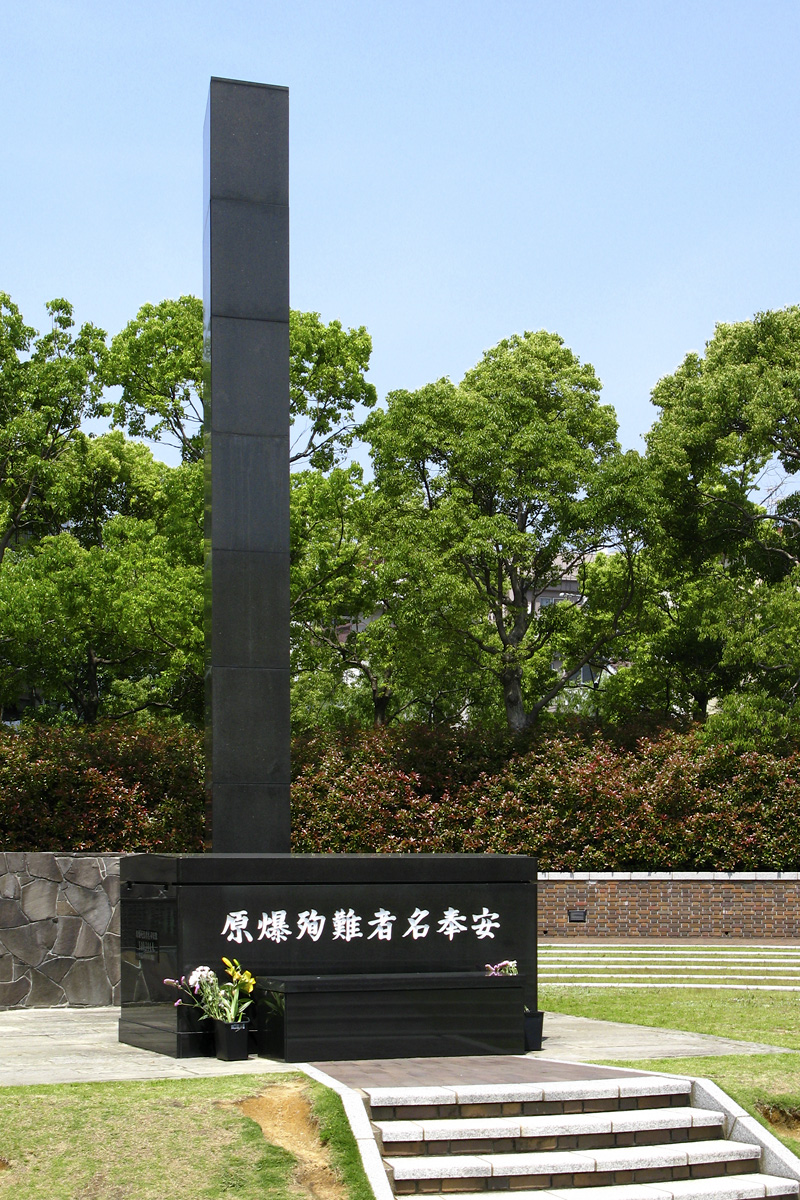 Ground Zero marker in Nagasaki, Japan